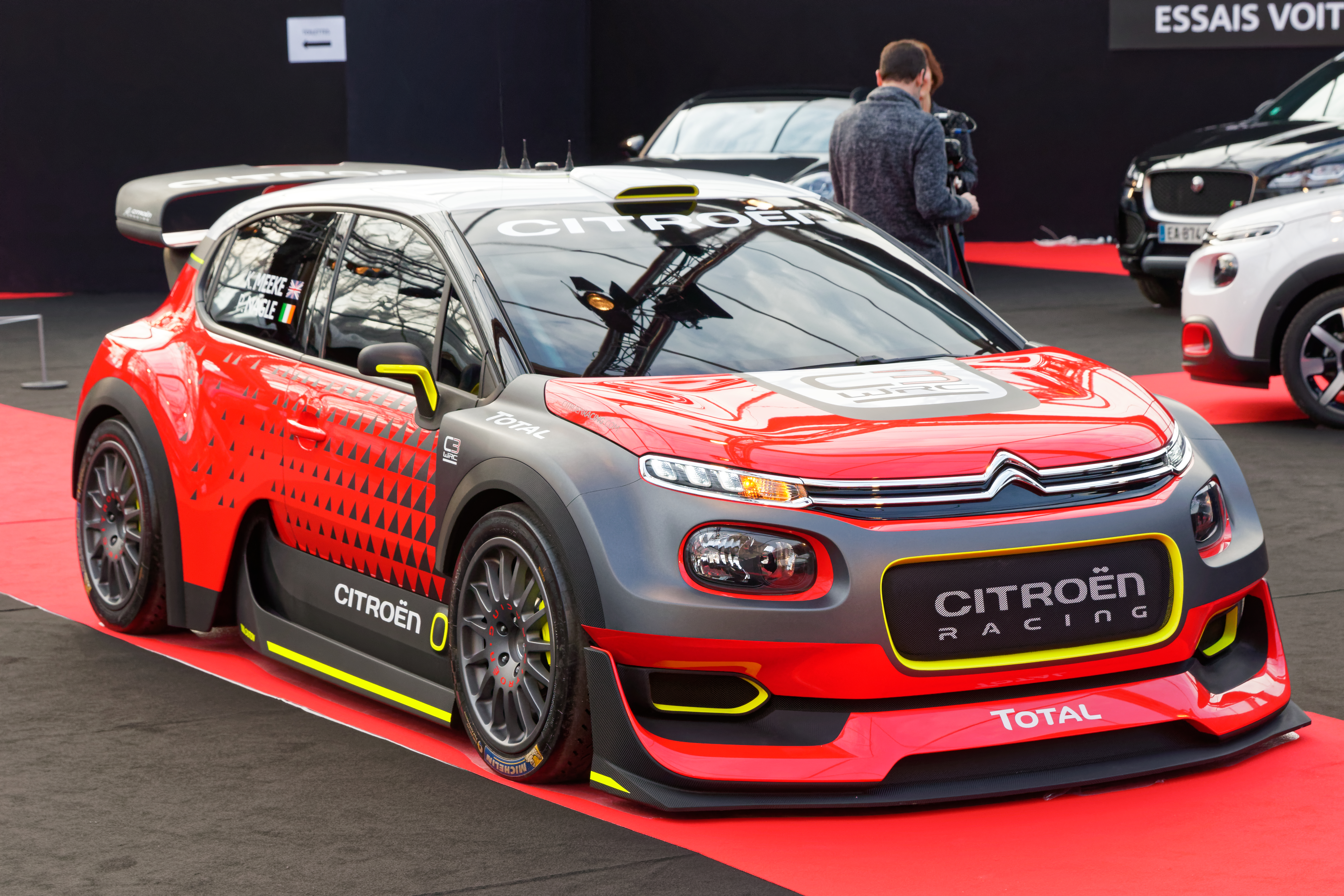 La Citroën C3 WRC exposée lors du festival automobile international 2016.